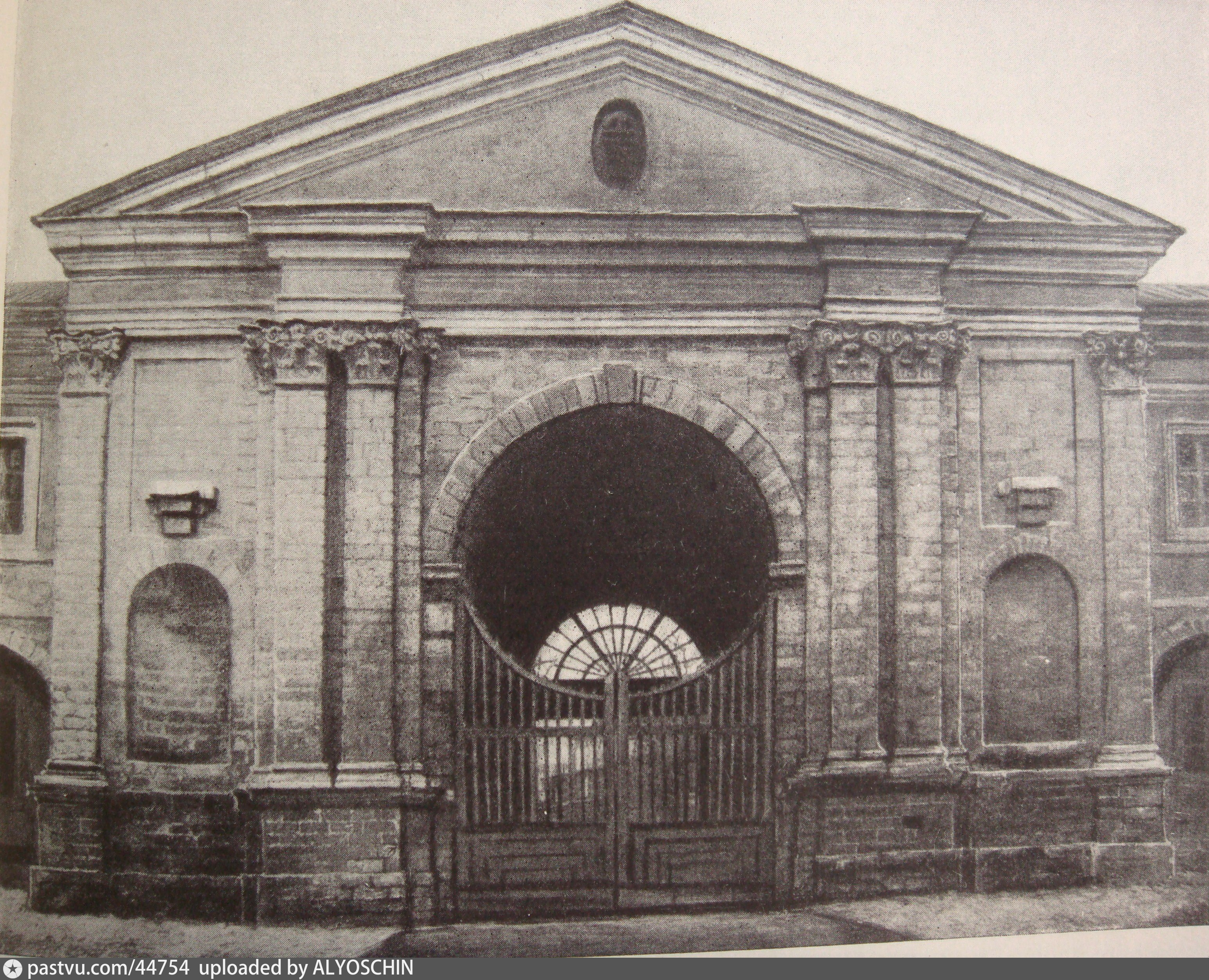 Главные ворота Лефортовского дворца